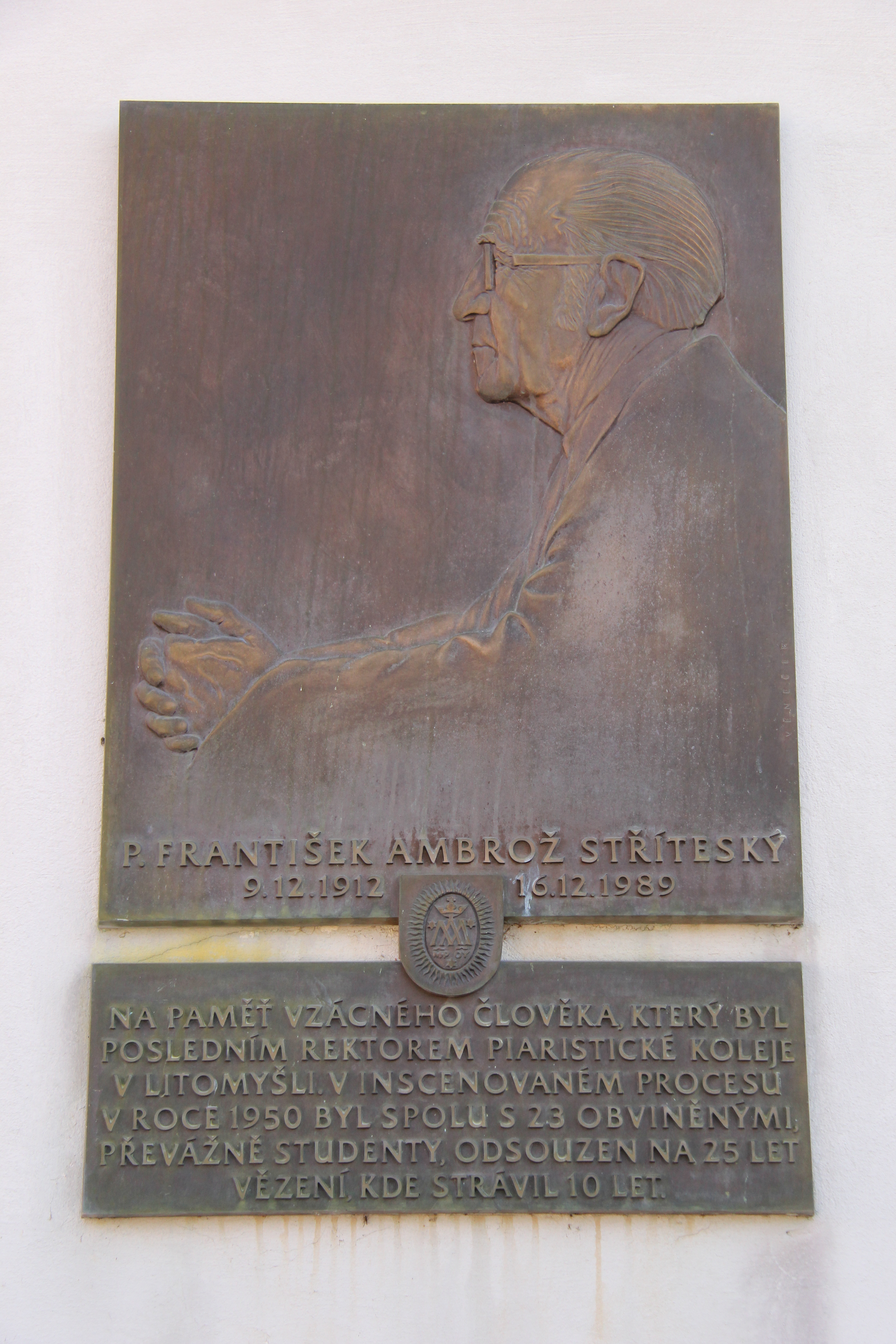 Pamětní deska Františka Ambrože Stříteského na bývalé piaristické koleji v Litomyšli (2017)